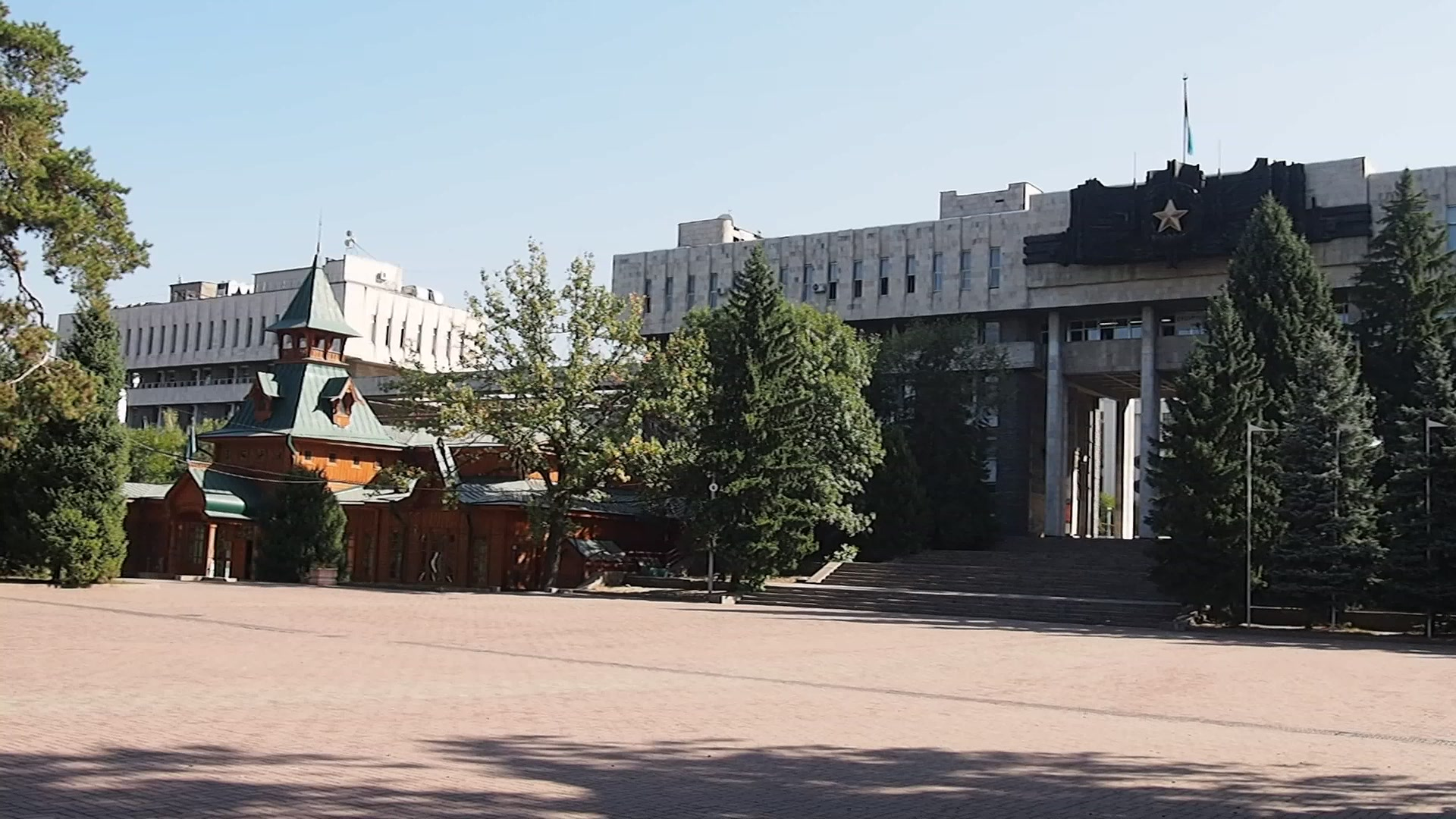 P9190546 02